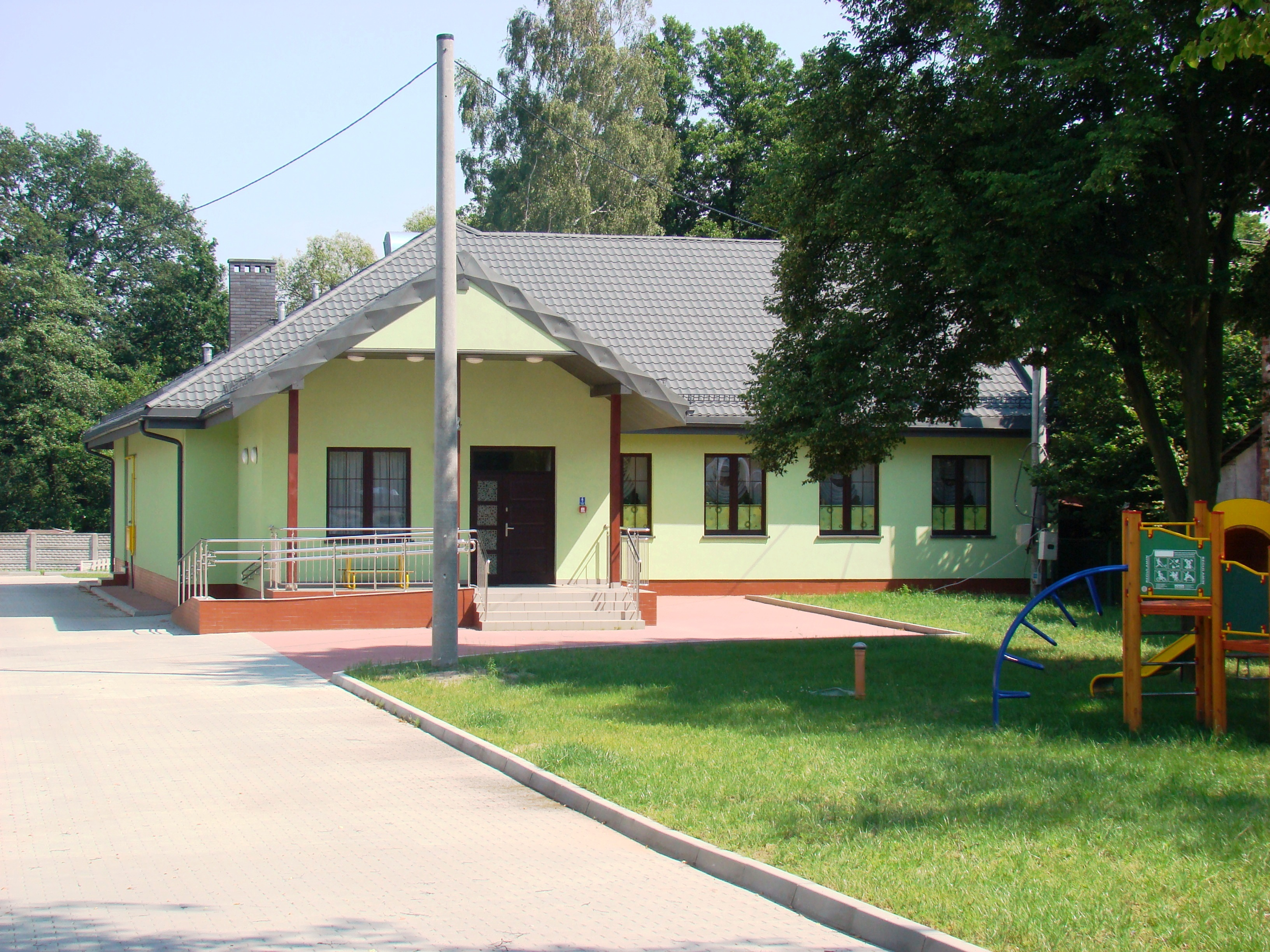 Świetlica wiejska w Nowej Wsi